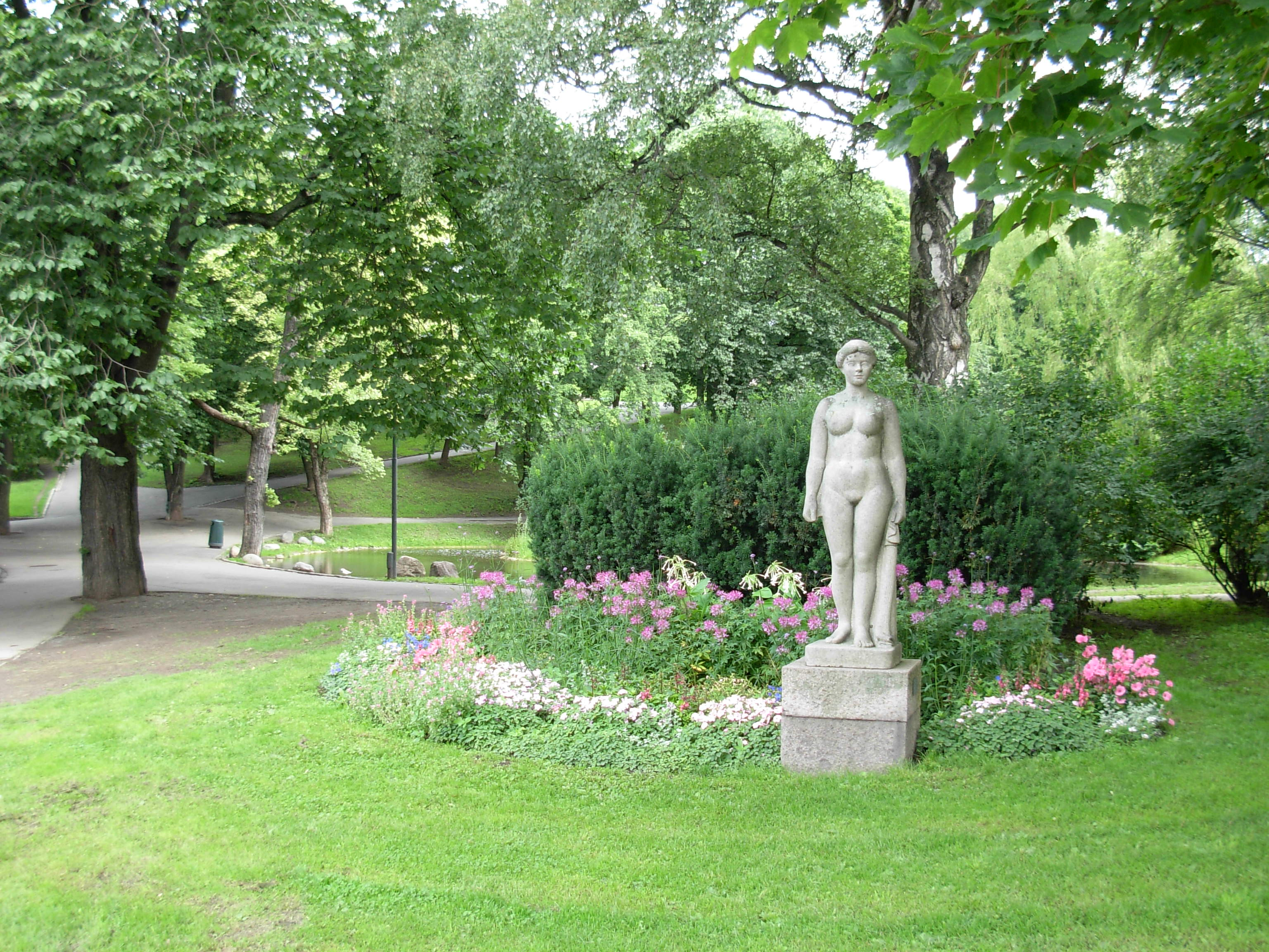 Inngangen til St. Hanshaugen fra syd